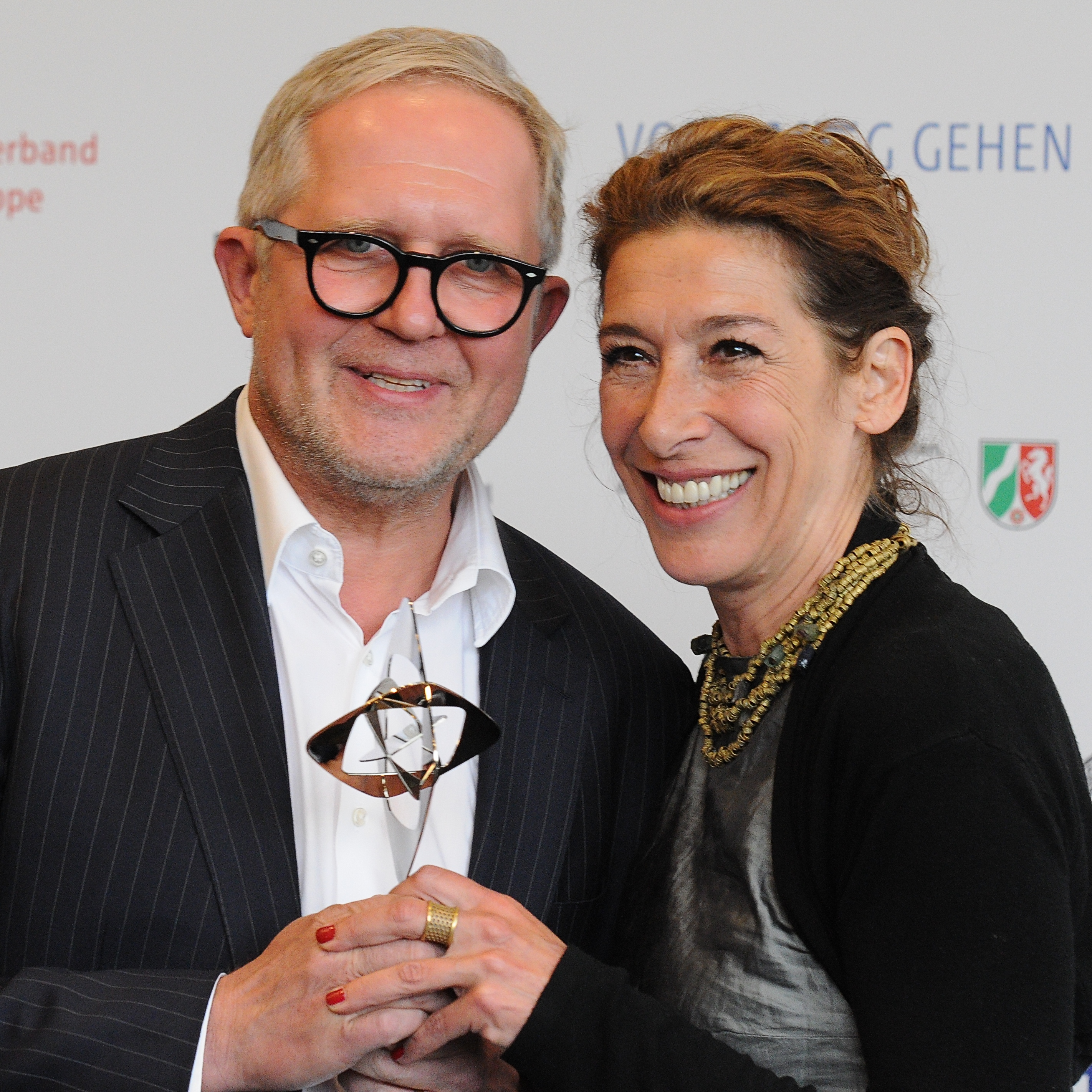 Adele Neuhauser und Harald Krassnitzer bei der Verleihung des Grimme-Preises 2014.